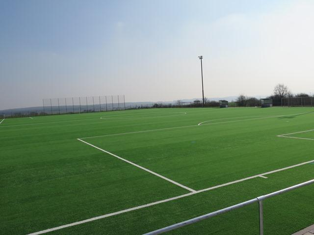 De fäerdege Projet an den "Ierzekaulen" (Perspektiv 1), Stade Albert-Kongs